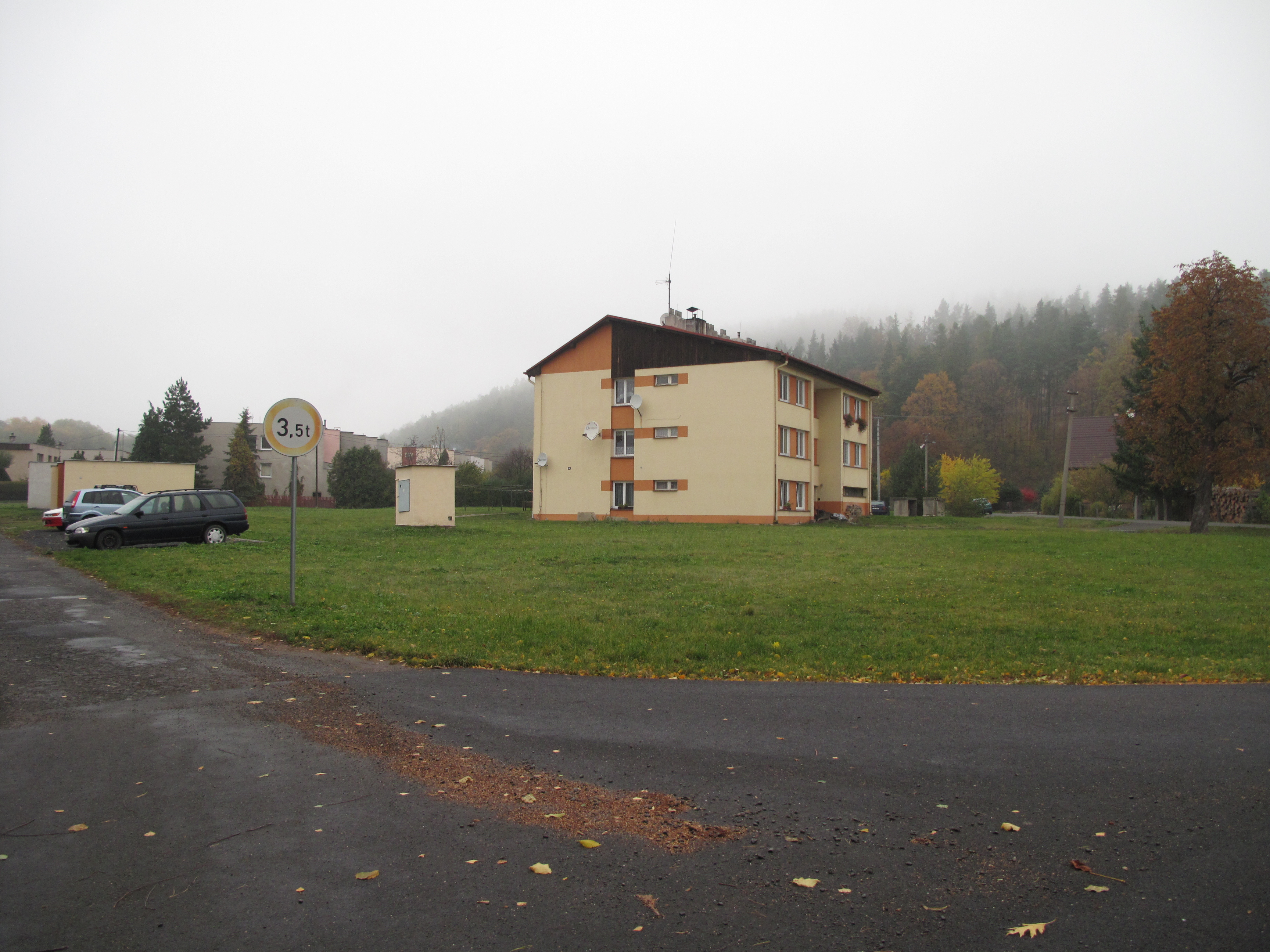 Hošťálkovy. Okres Bruntál, Česká republika.